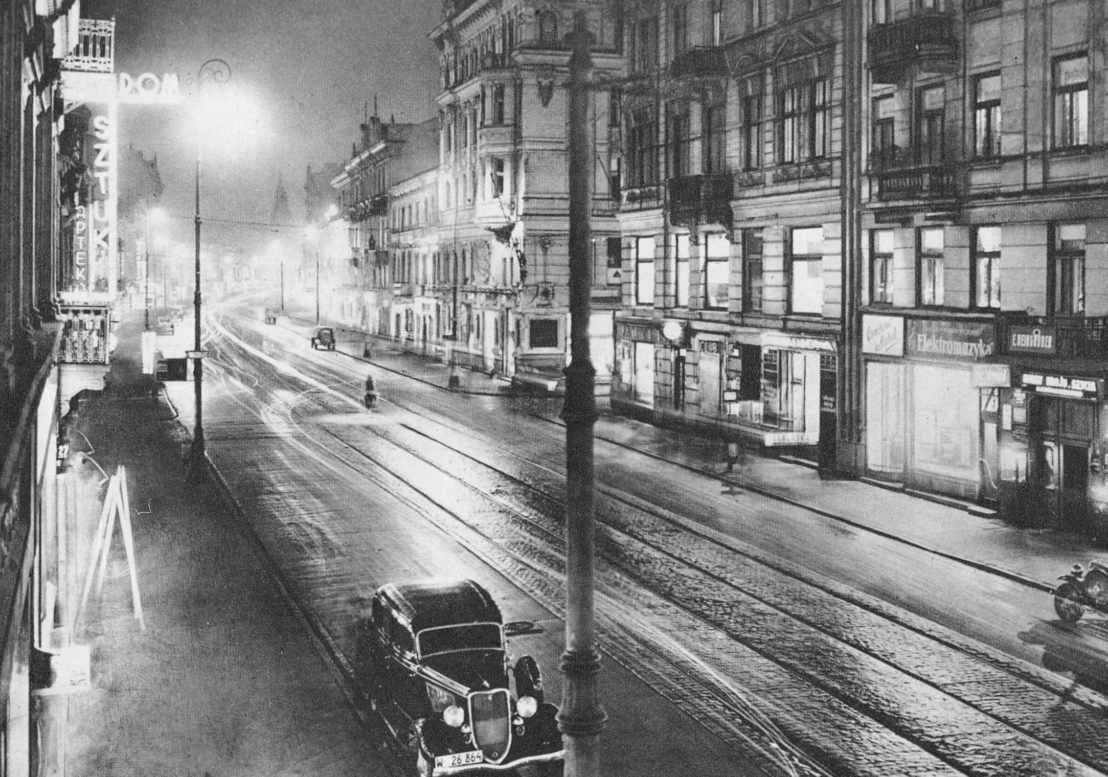 Ulica Nowy Świat w Warszawie nocą